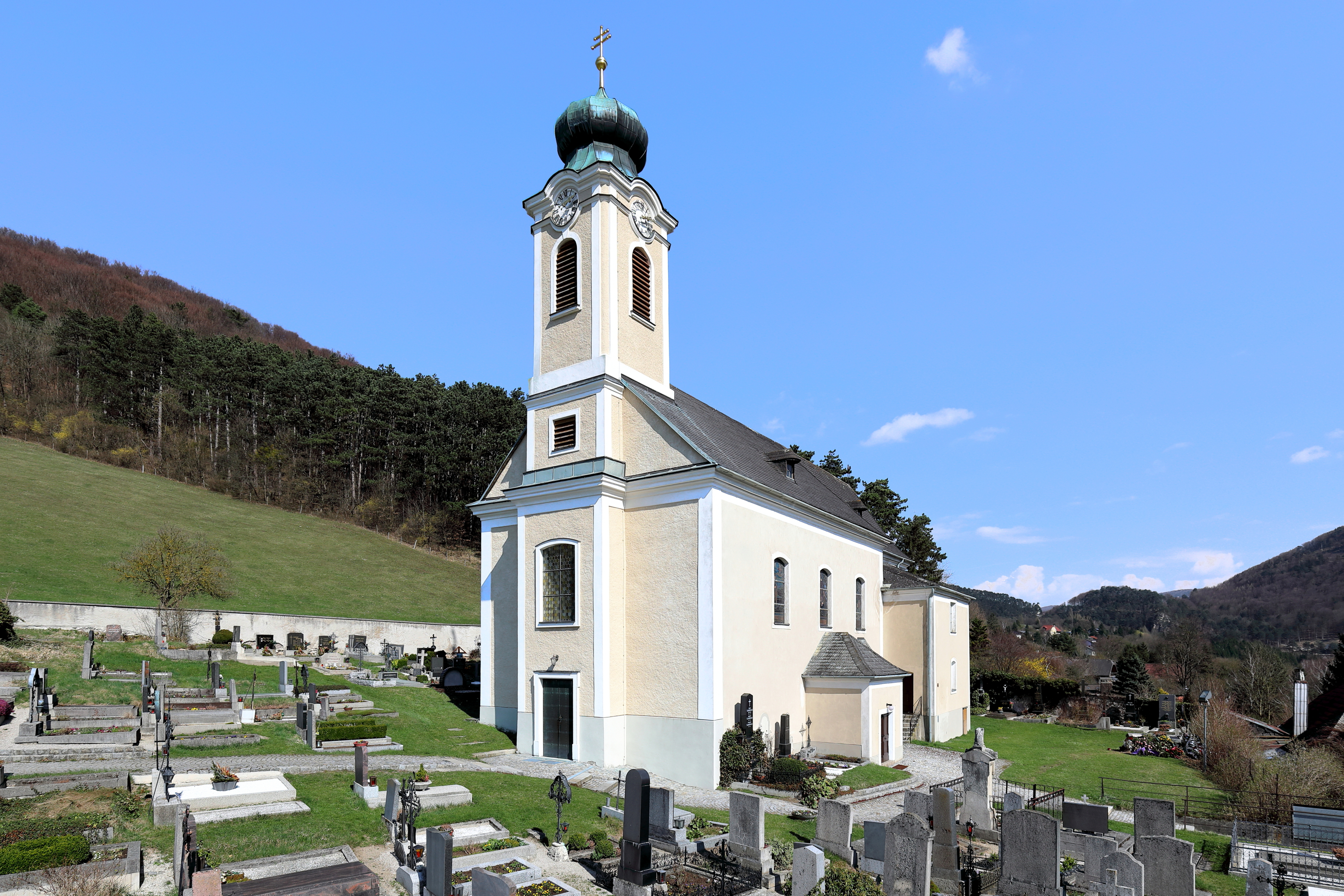 Die röm.-kath. Pfarrkirche hl. Johannes der Täufer in der niederösterreichischen Marktgemeinde Altenmarkt an der Triesting. Eine barocke Saalkirche (1783/86) in erhöhter Lage mit einem spätgotischen Chor.